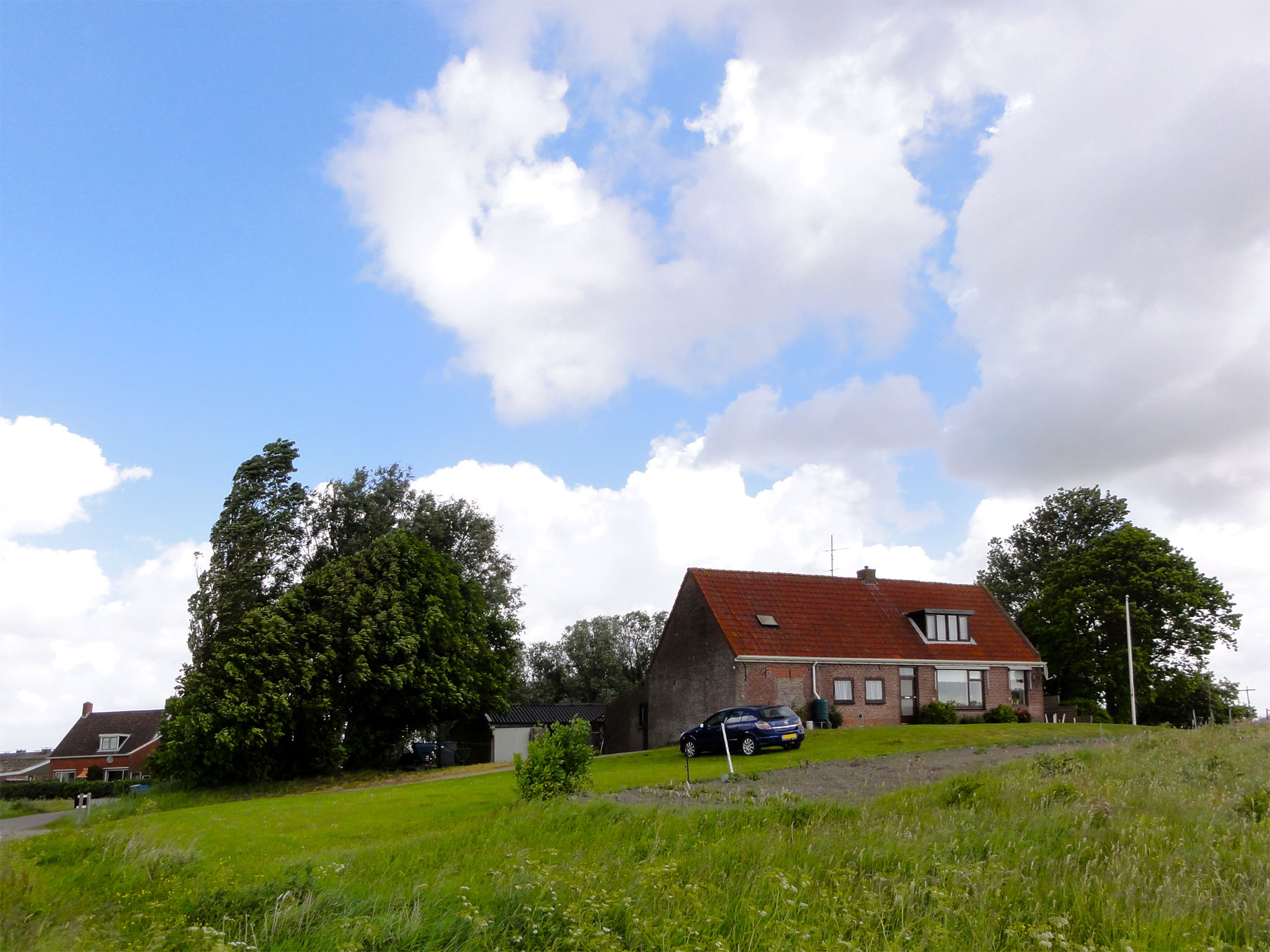 Huisterp bij Unemaloane nabij Blija